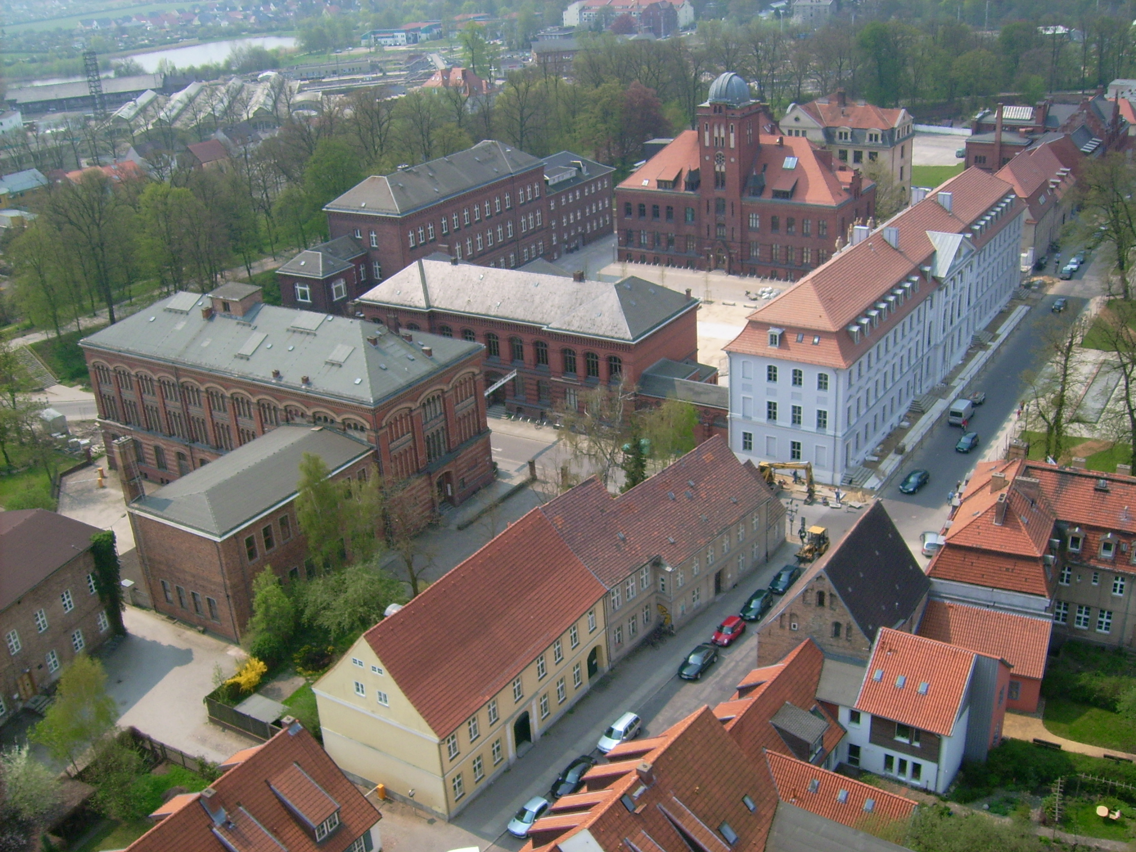 alter Uni-Campus der EMAU Greifswald in Greifswald vom Dom St. Nikolai herunter